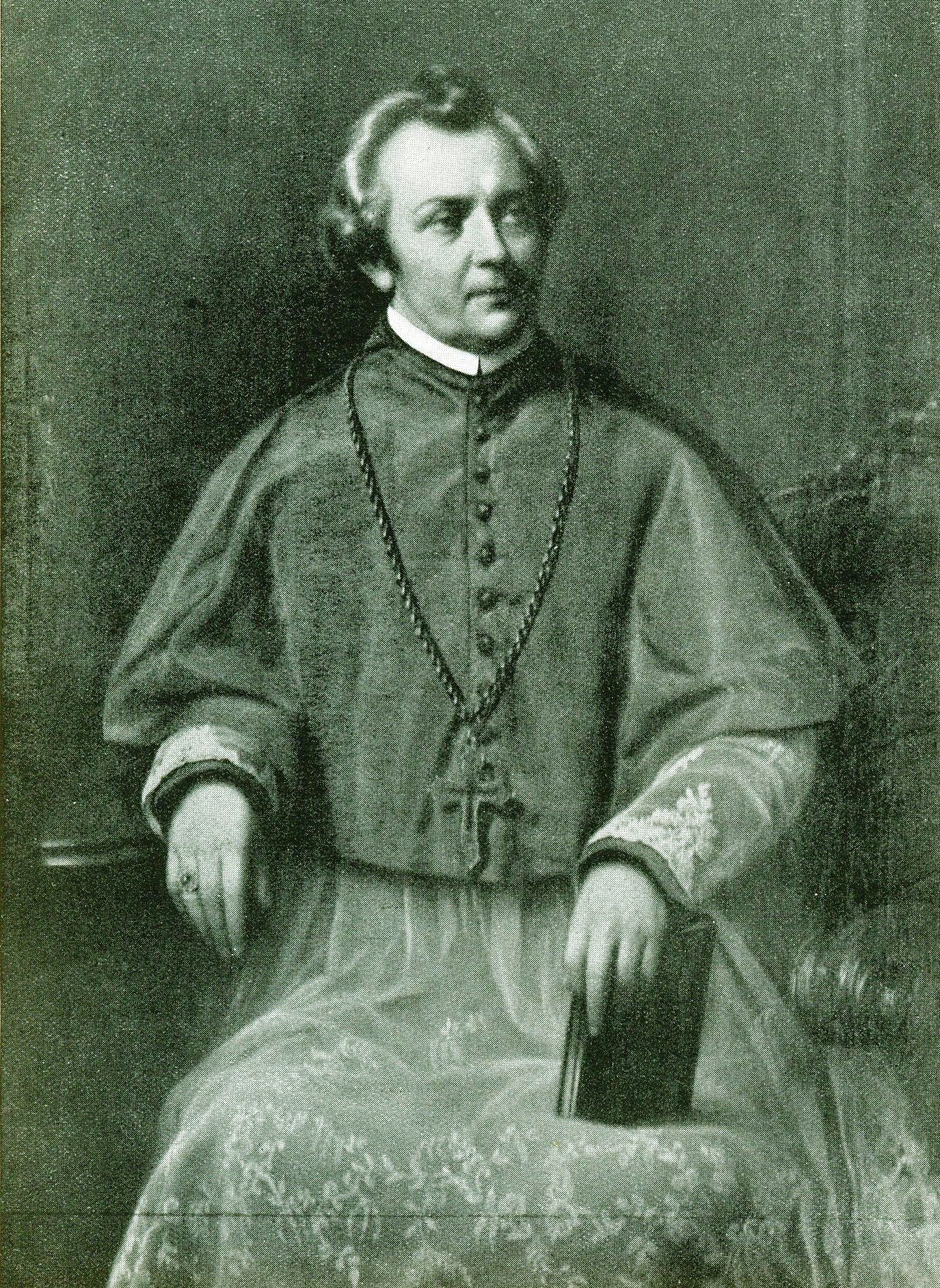 Portrait des Breslauer Bischofs Heinrich Förster